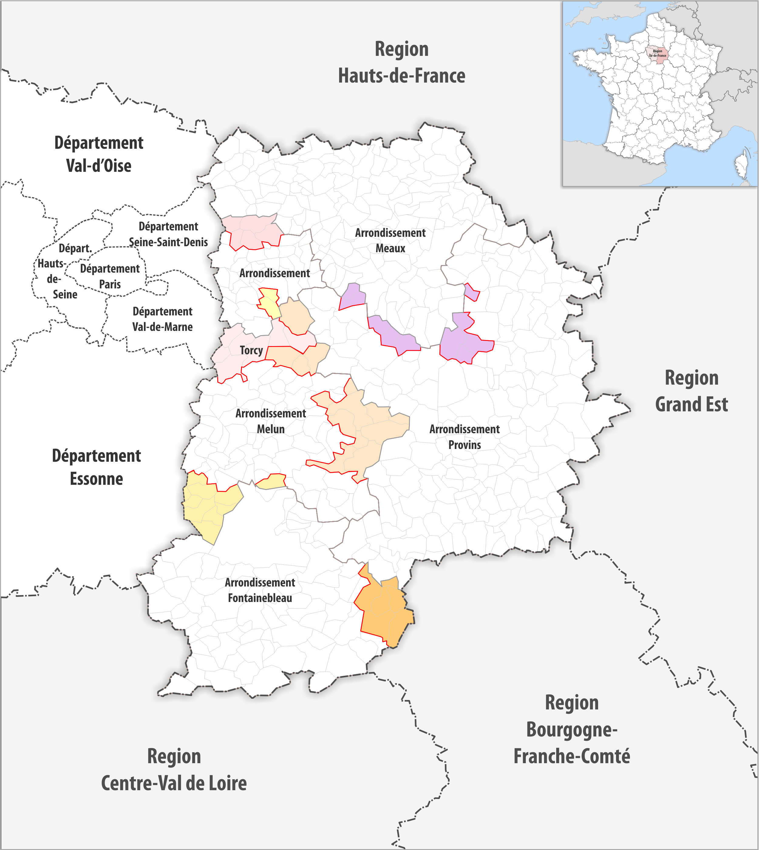 Arrondissements Anpassungen auf 2017 im Departement Seine-et-Marne